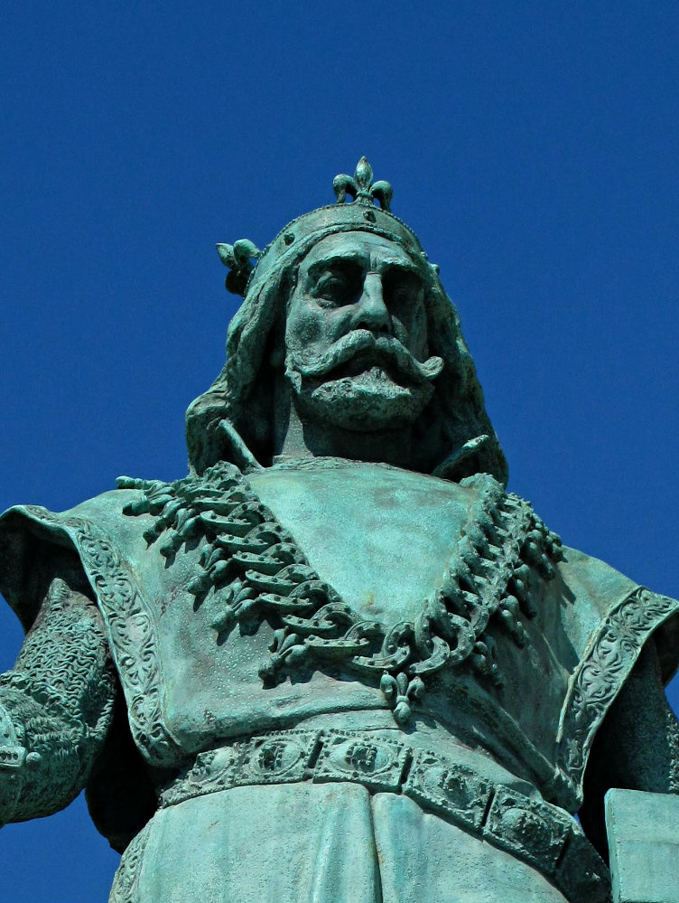 I. Károly szobra a Hősök téri Millenniumi emlékművön, Budapesten